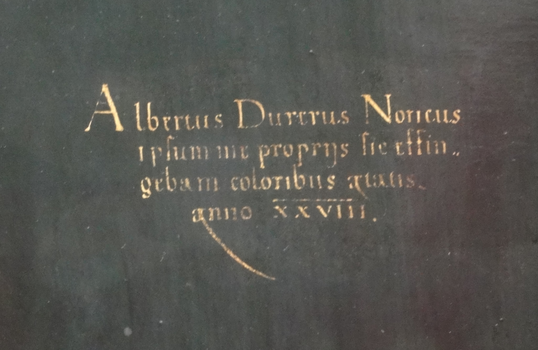 detail